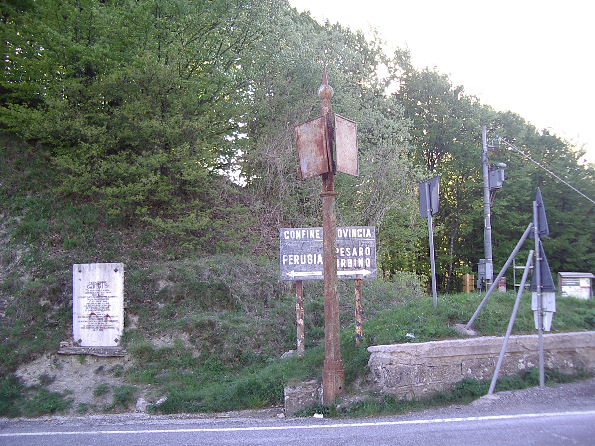 Passo di Bocca Trabaria Ombrie Marches Italy